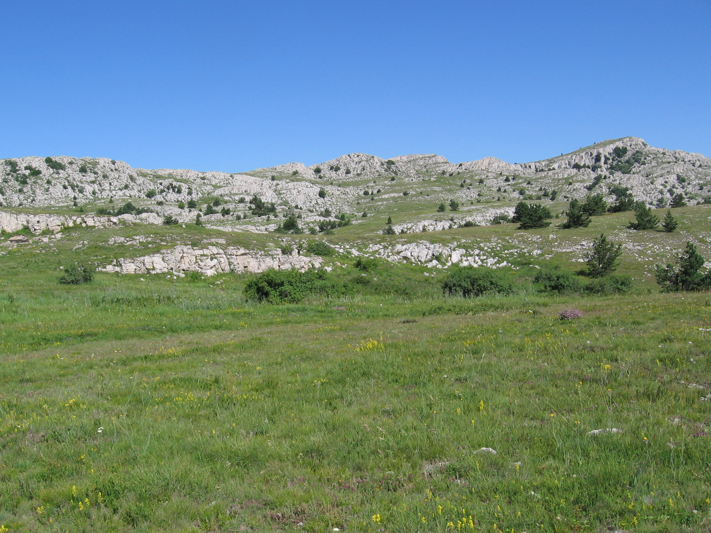 Бабуган